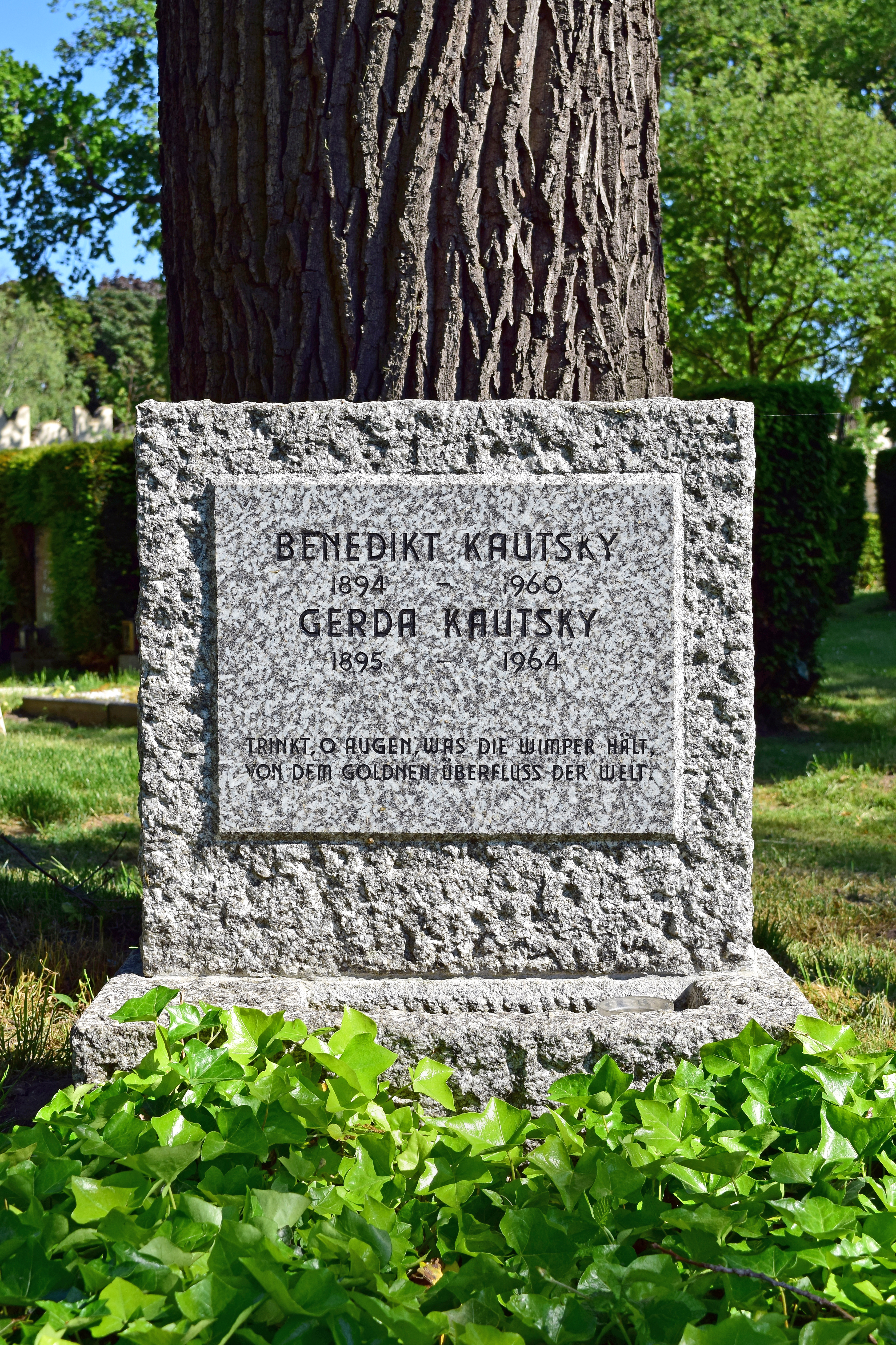 Ehrenhalber gewidmetes Grab von Benedikt Kautsky auf dem Urnenhain der Feuerhalle Simmering, Gruppe 2, Ring 3, Abt. 1, Nr. 74